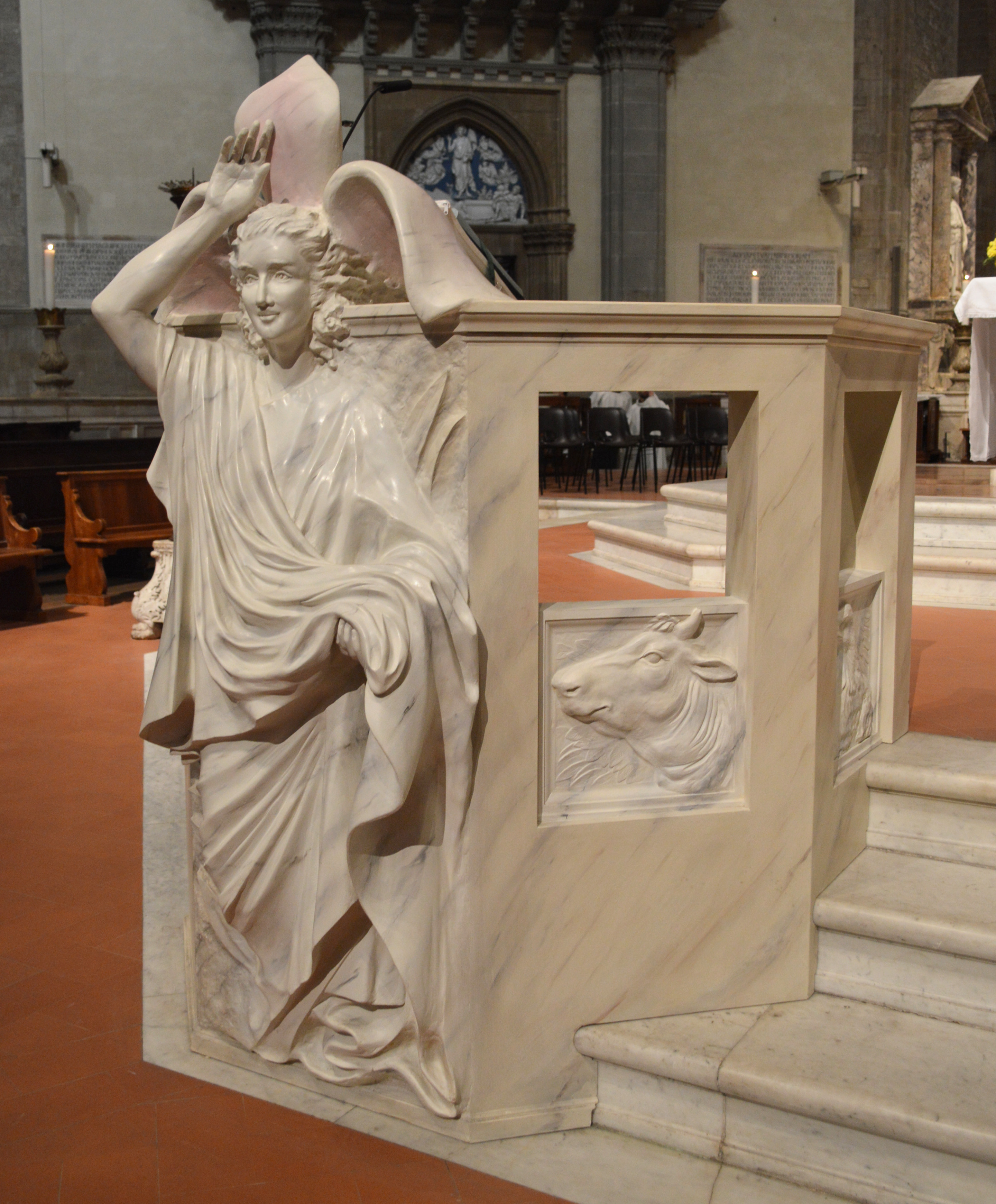 L'ambone visto di trequarti.